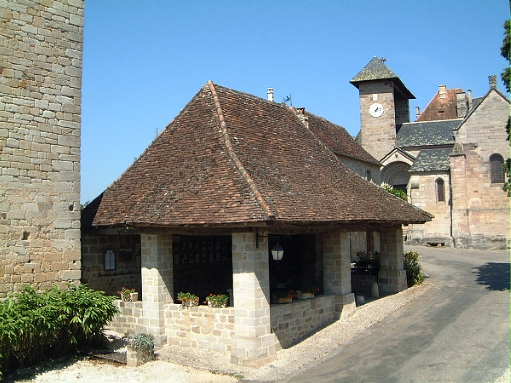 Curemonte ,Correze, un des plus beaux village de France